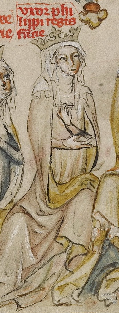 Anežka Meránská